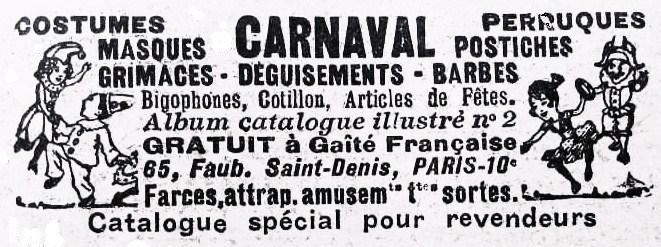 Publicité pour un magasin de produits pour la fête et le carnaval.